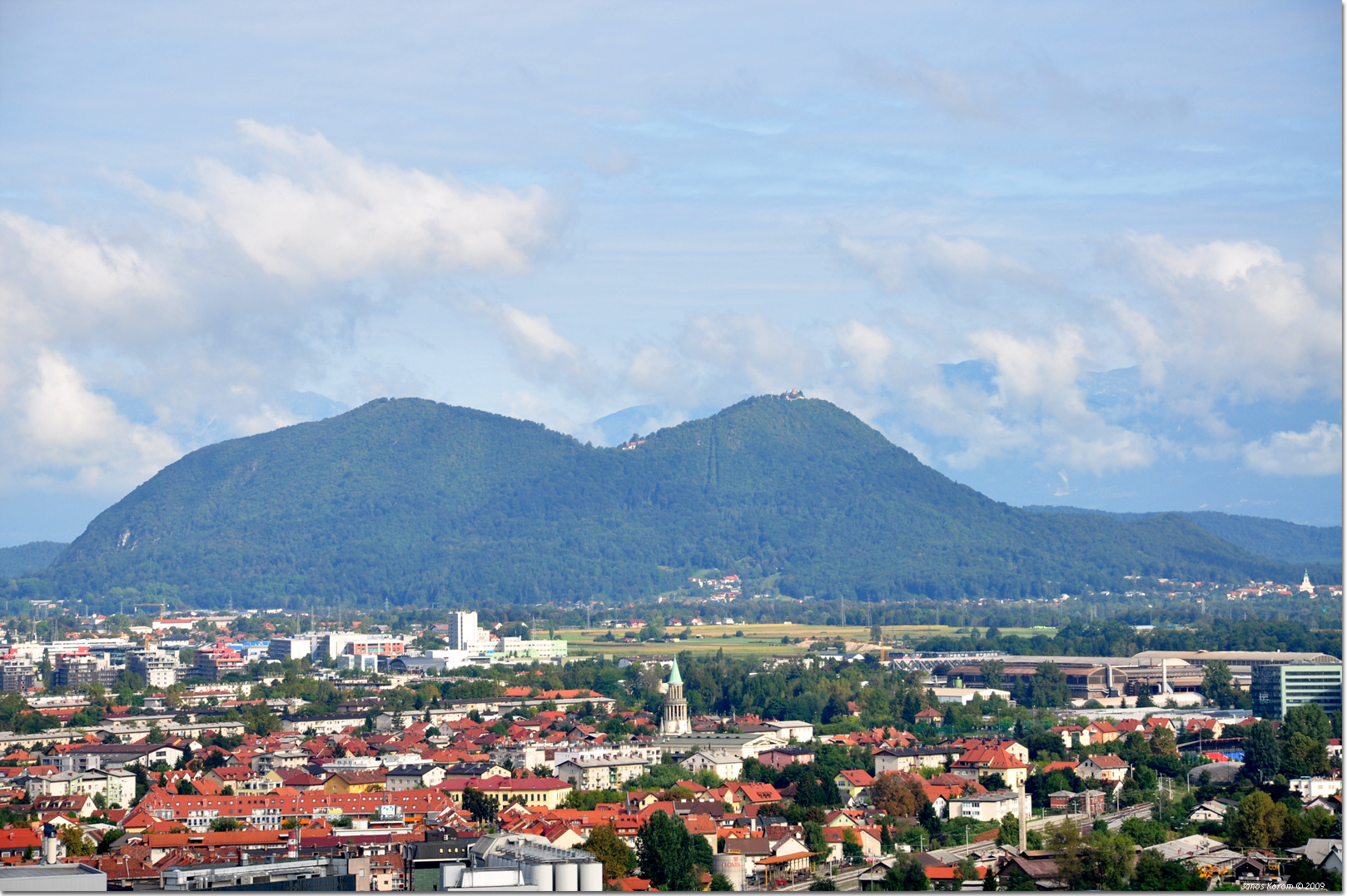 Ljubljana (169)